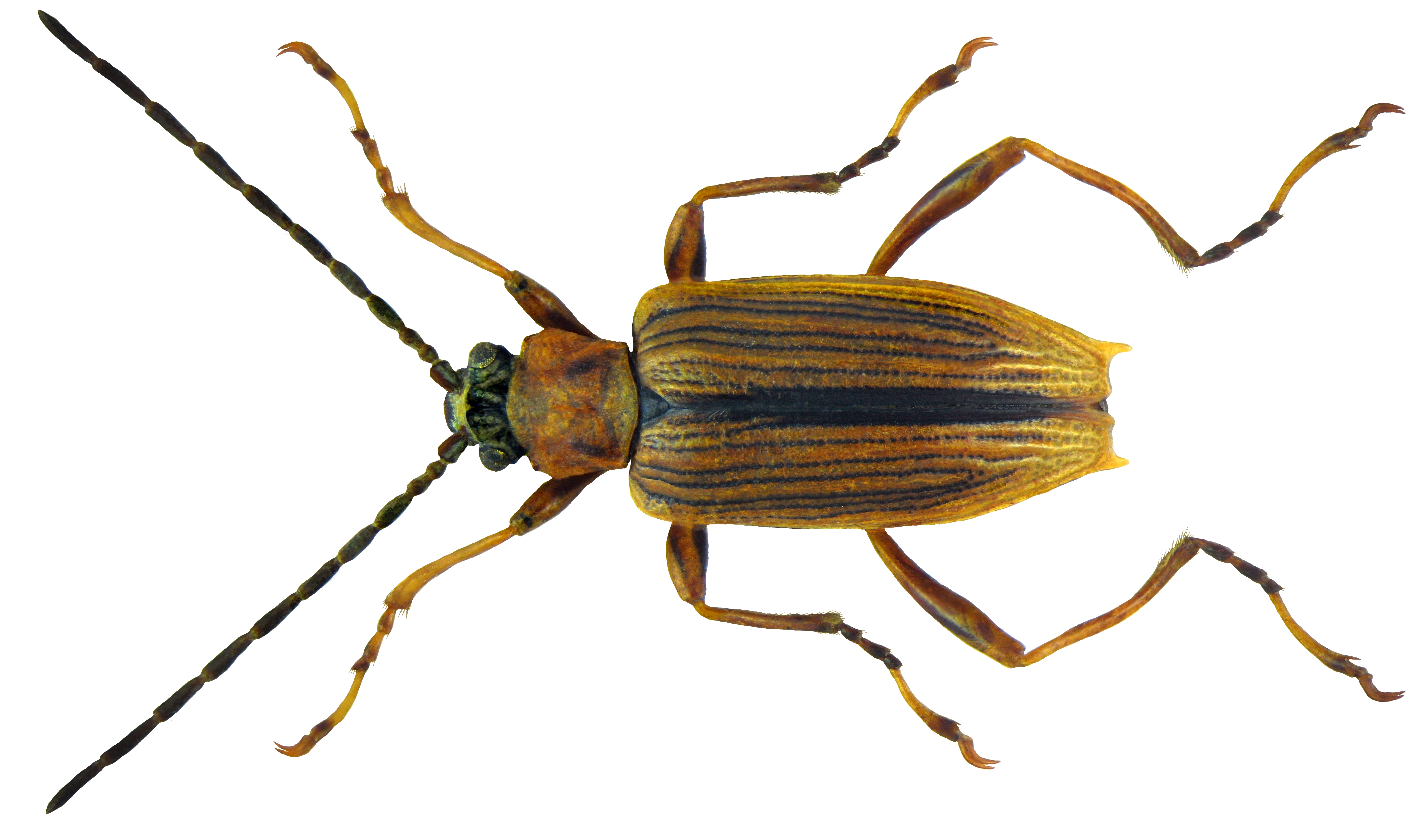 Macroplea mutica (Fabricius, 1792) Familie: Chrysomelidae Groesse: 4,5-6,0 mm Verbreitung: Mitteleuropa, südliches Nordeuropa Oekologie: im Brackwasser der Nord-und Ostsee an Ruppia maritima Fundort: England P.Harwood coll Pres, 1957; Coll. Museum Oxford Photo: U.Schmidt, 2011